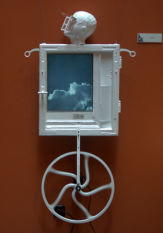 Dzieło Roberta Lenarda-Bachamanna z cyklu "Machinobolizmy"